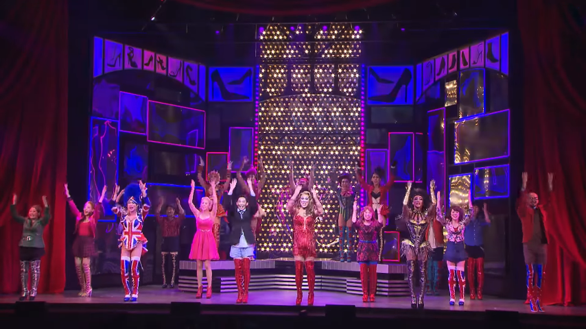 뮤지컬 킹키부츠 프레스콜